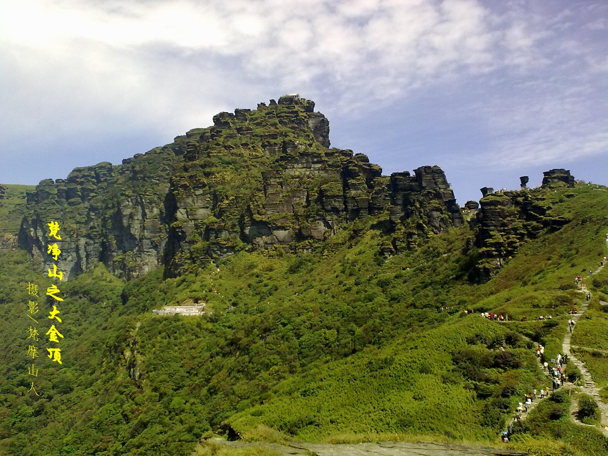 梵净山大金顶